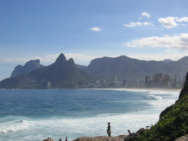 Brasil, Rio de Janeiro, Strand von Leblon und Ipanema